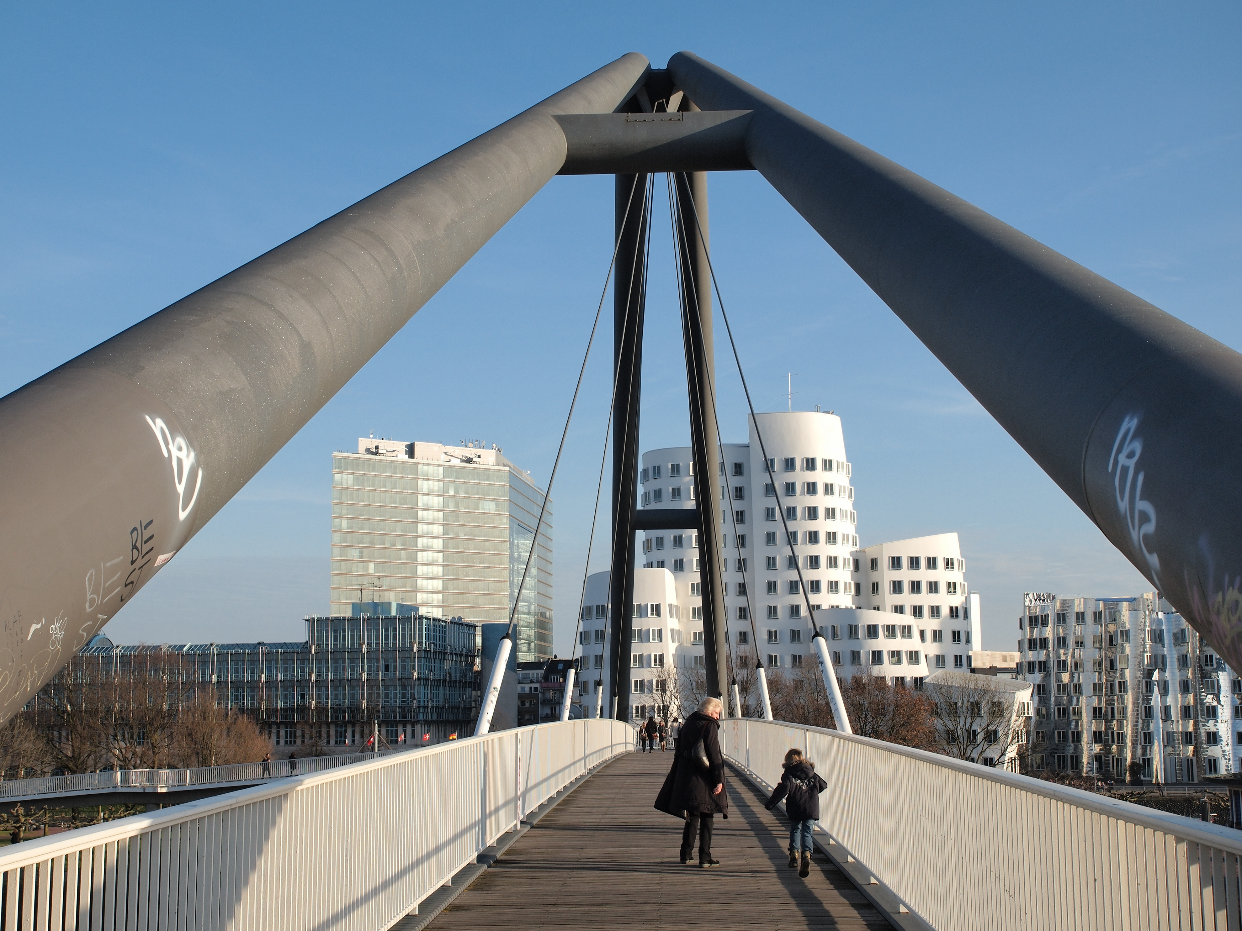 Blick über die Hafenbrücke im Düsseldorfer alten Zoll- und Handelshafen auf das Gebäude Stadttor und die Gehry-Bauten, Ansicht von Nordwesten